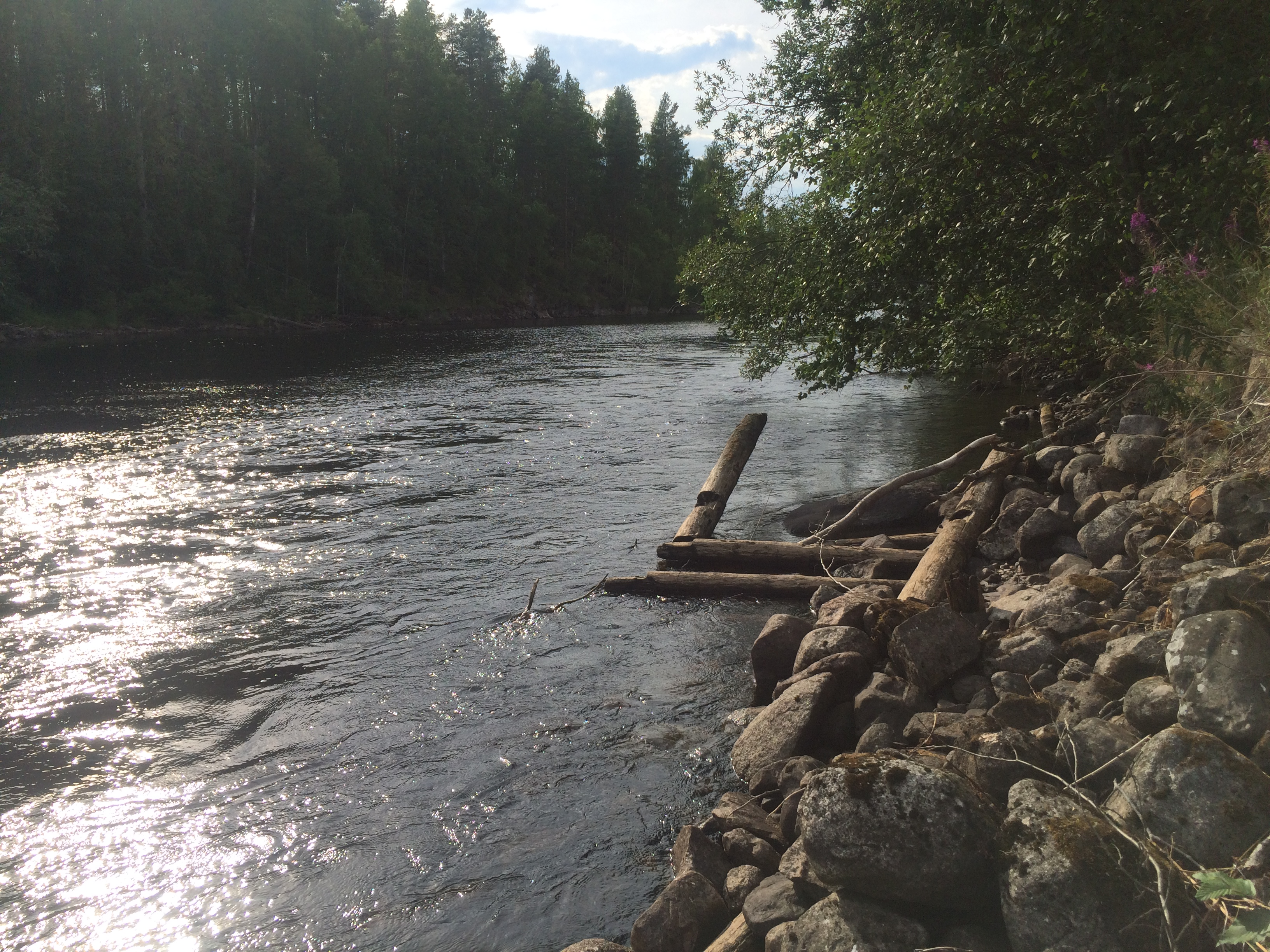 Заводская протока.